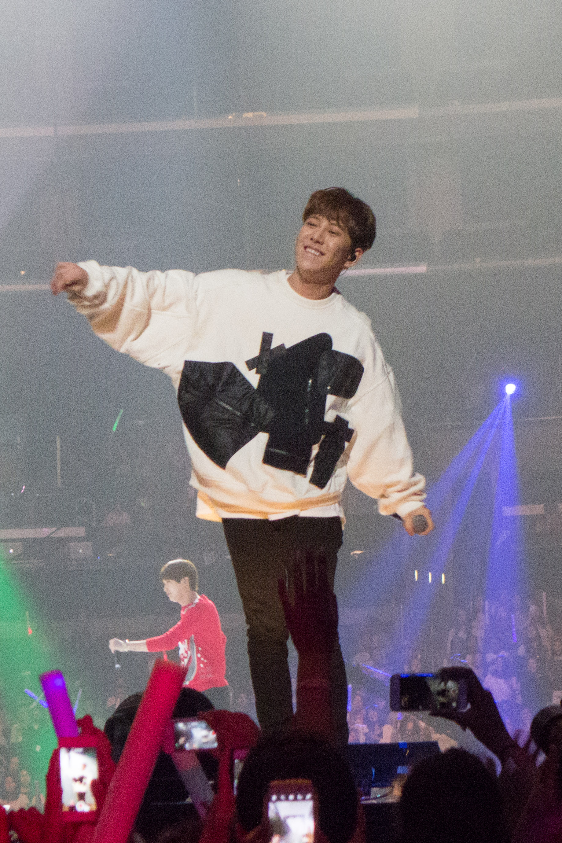 Block B at KCON 2015, Los Angeles, Park Kyung